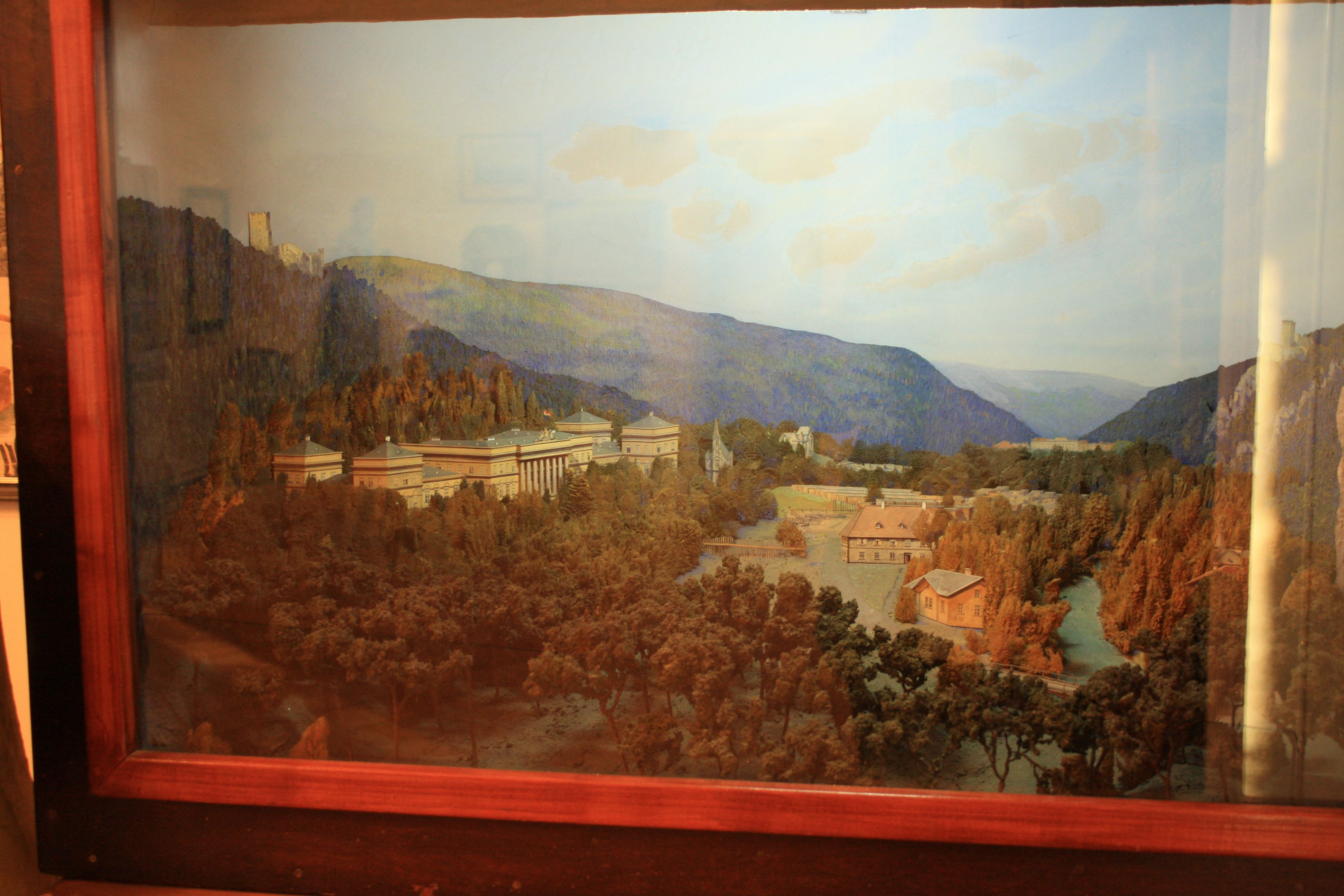 Ausstellungsstück im Rollettmuseum in Baden, Niederösterreich